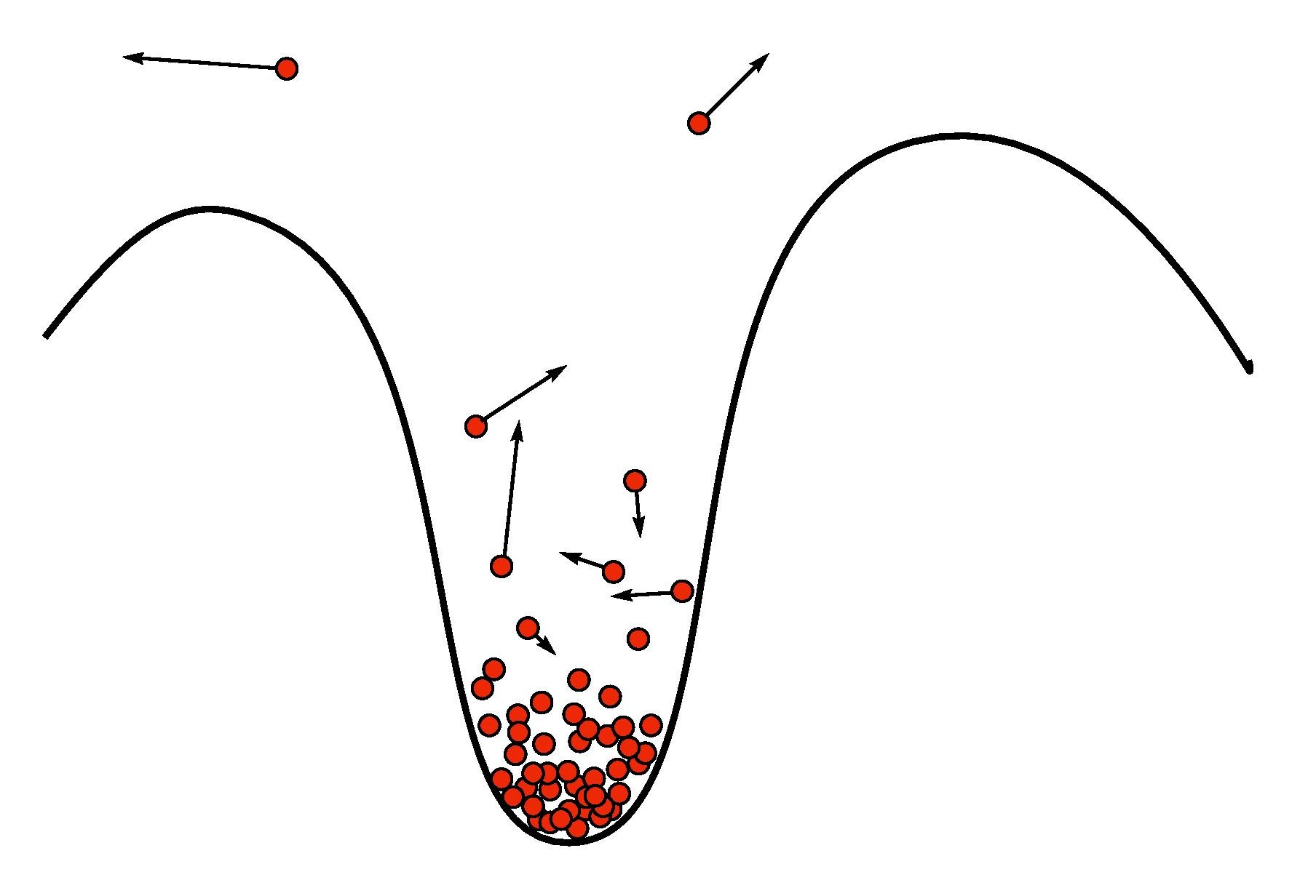 gaz d'atomes s'évaporant